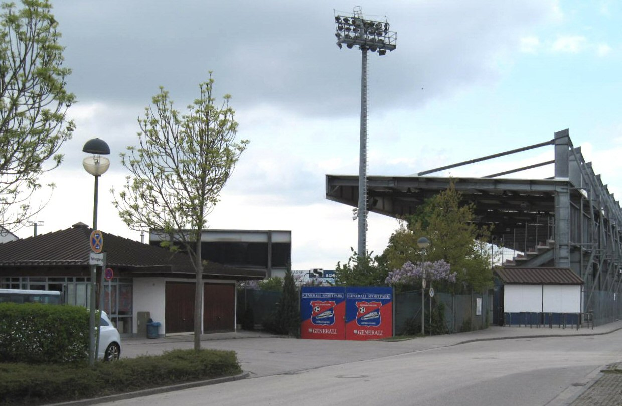 Sportpark Unterhaching, Ansicht von Süden